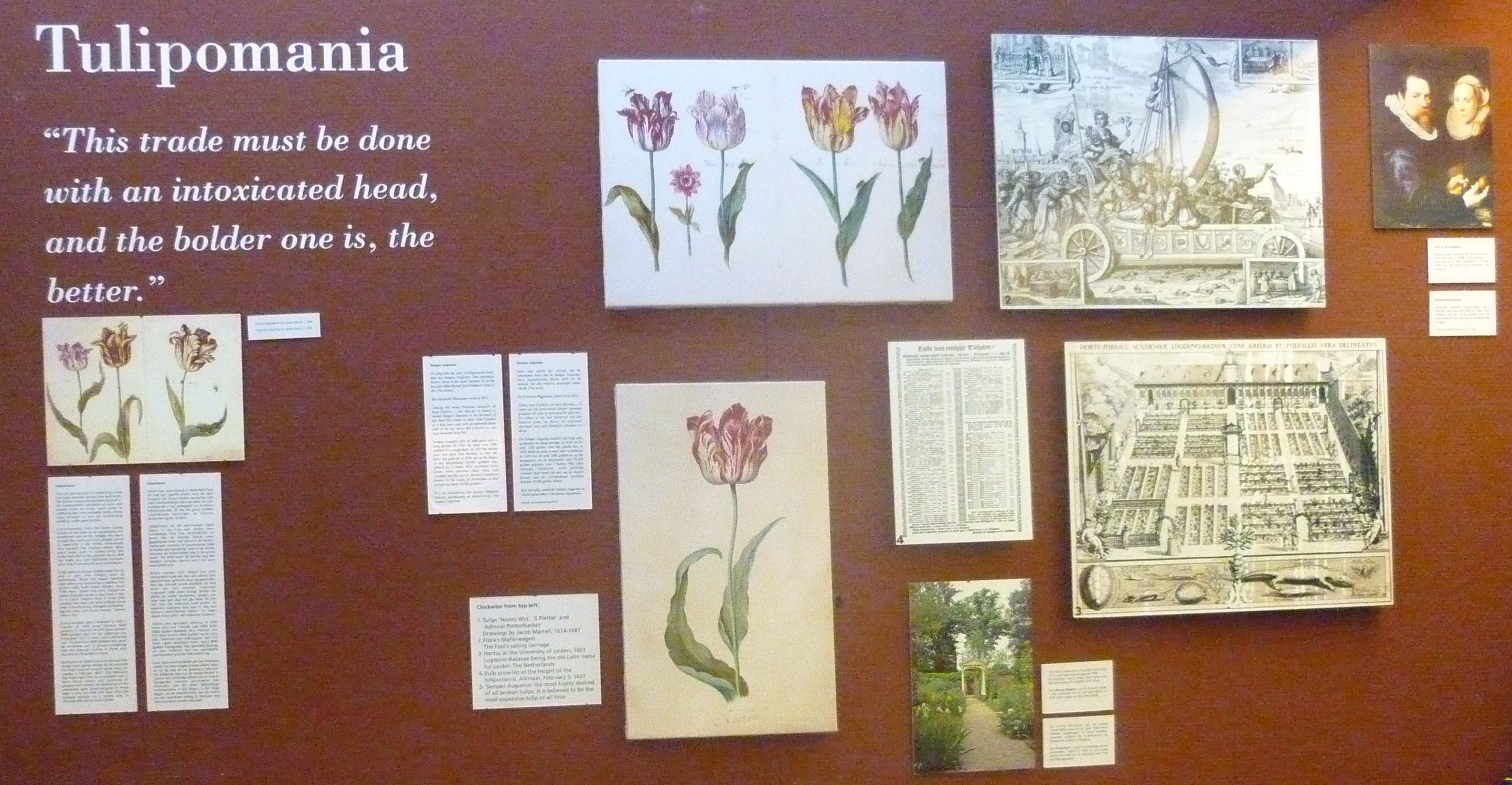 Tegelmuseum Amsterdam